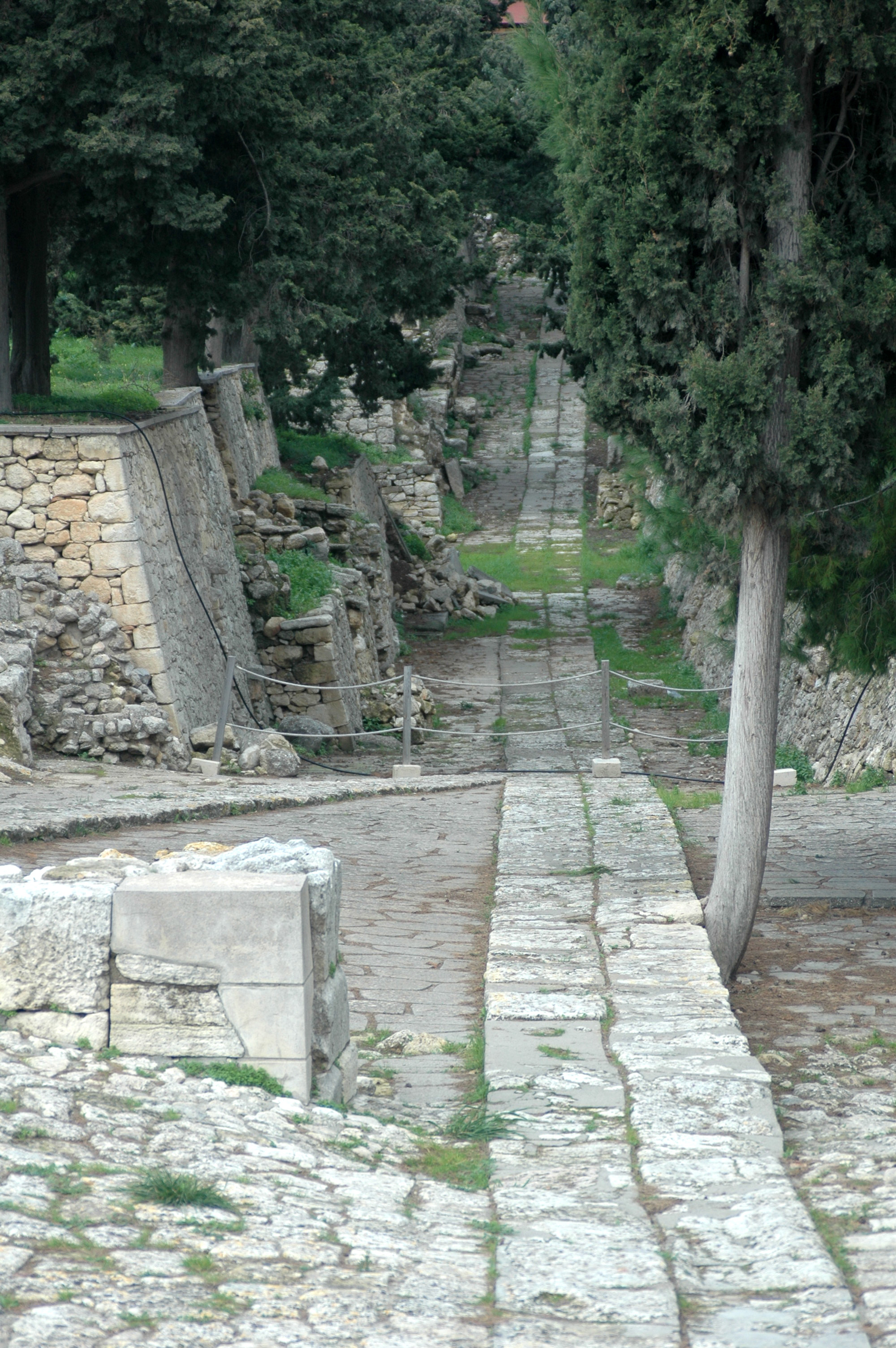 Knossos, voie royale. Photo prise par Harrieta171 le 28/01/06